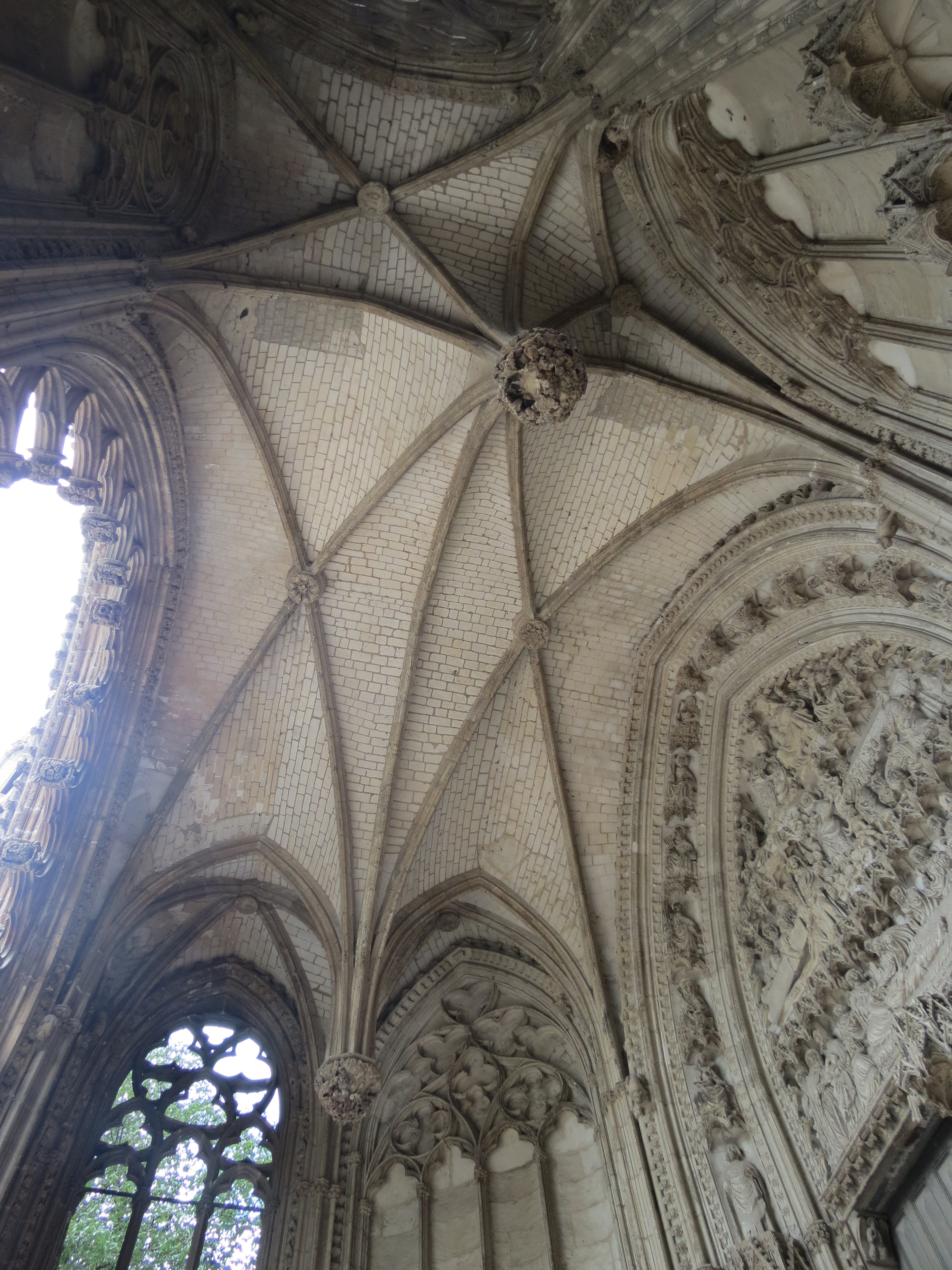 Voûtes du portail des Marmoussets.